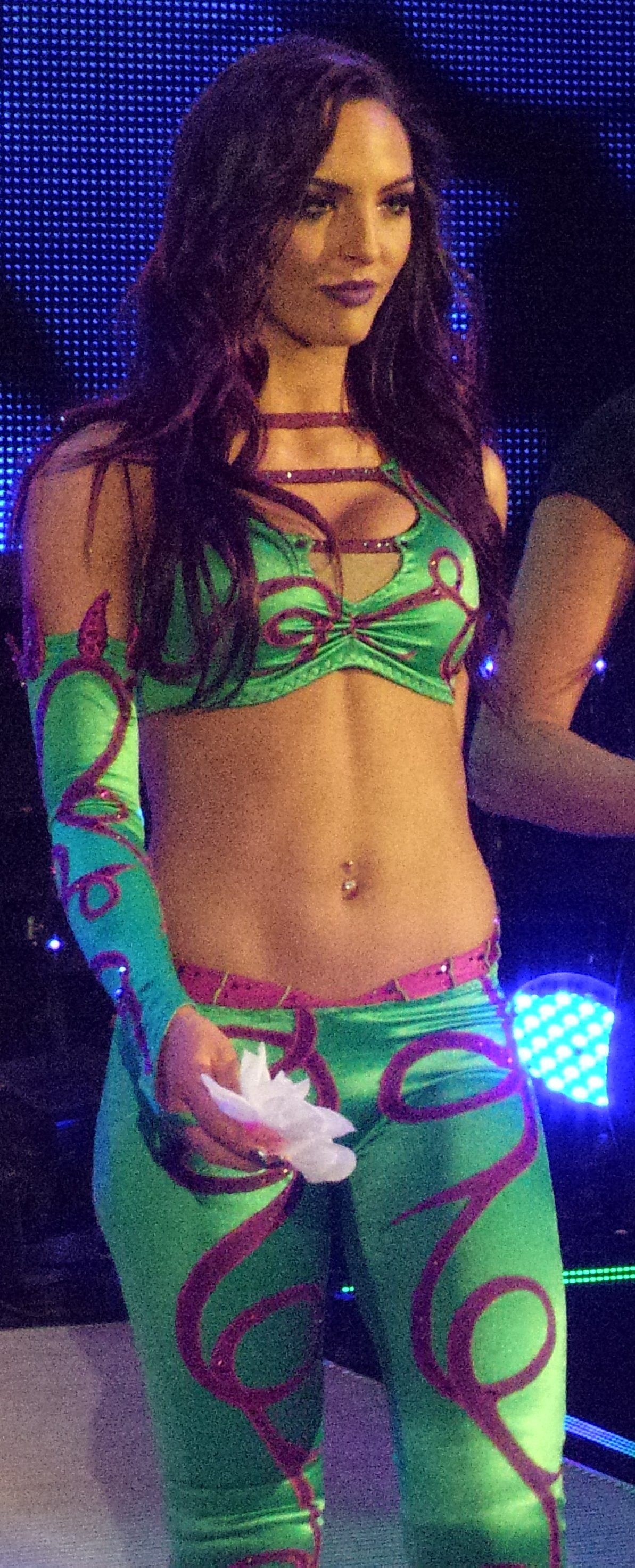 P_20170201_203637_004